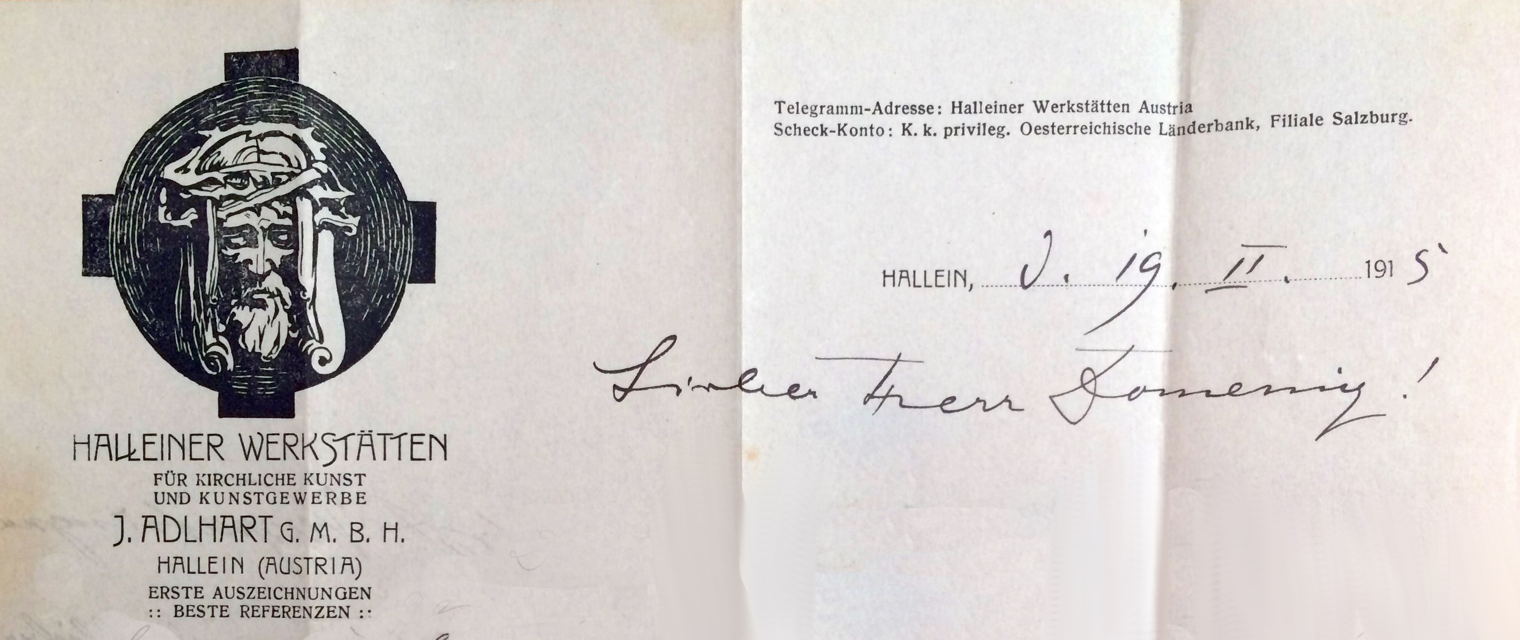 Briefkopf der Adlhartwerkstätte 1915